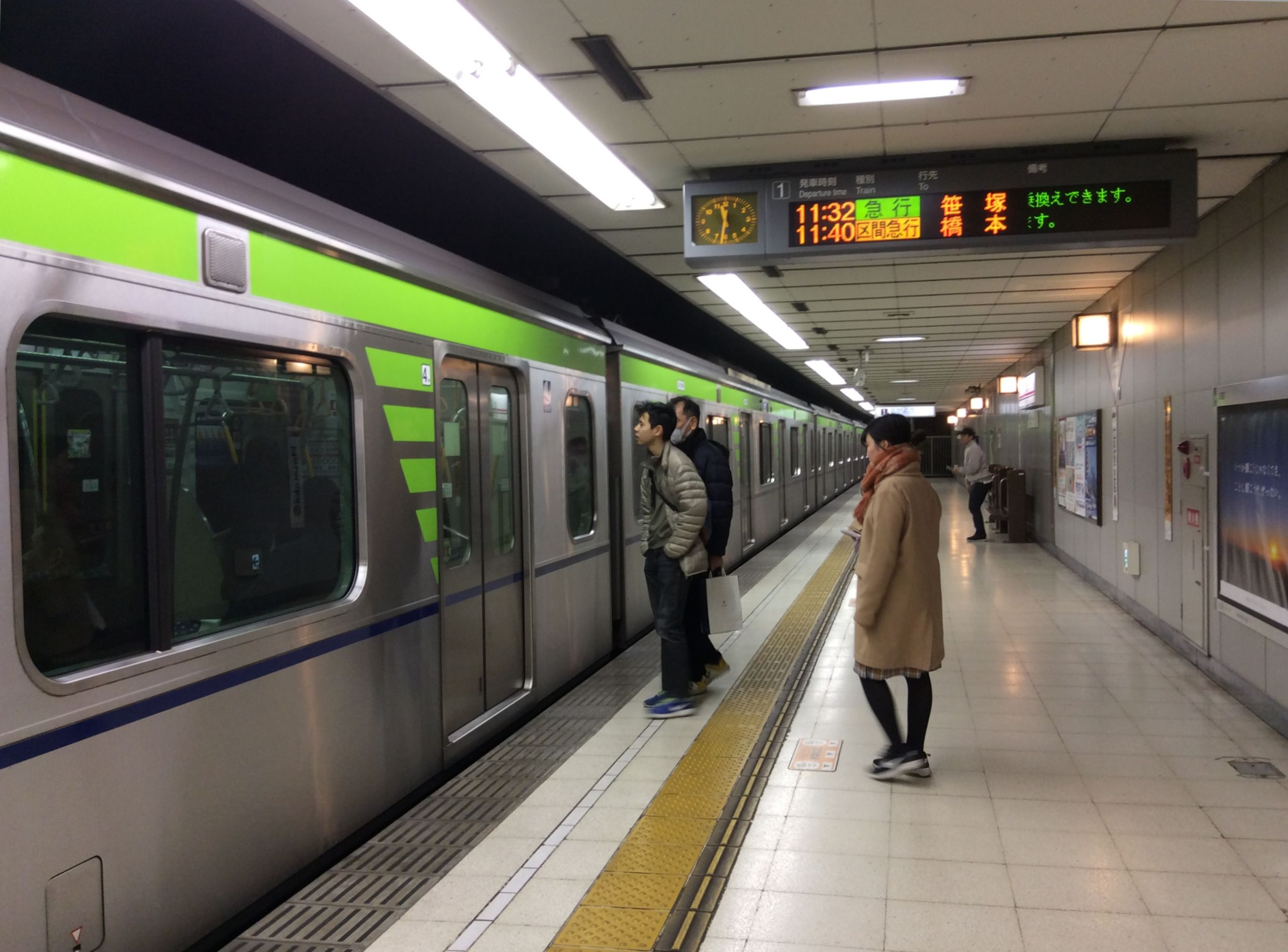 京王新線 初台駅